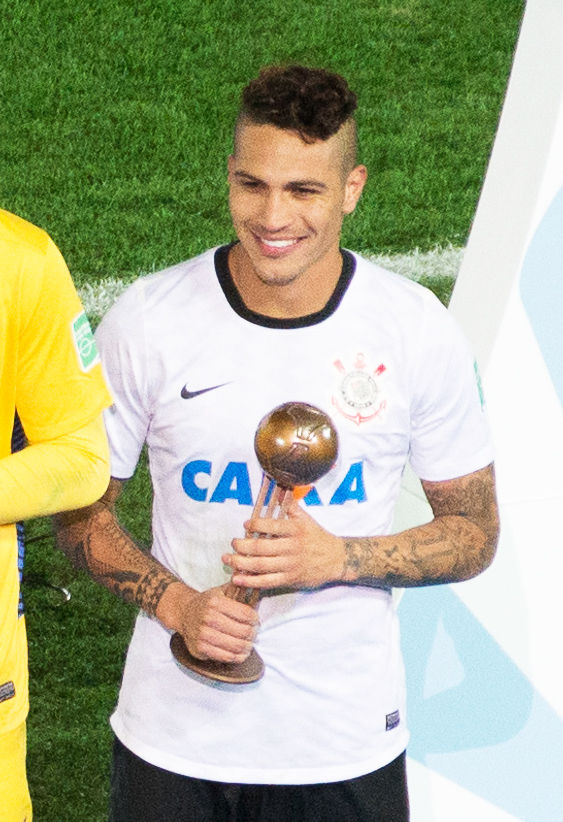 Guerrero, the Adidas bronze ball winner in FIFA Club World Cu 2012